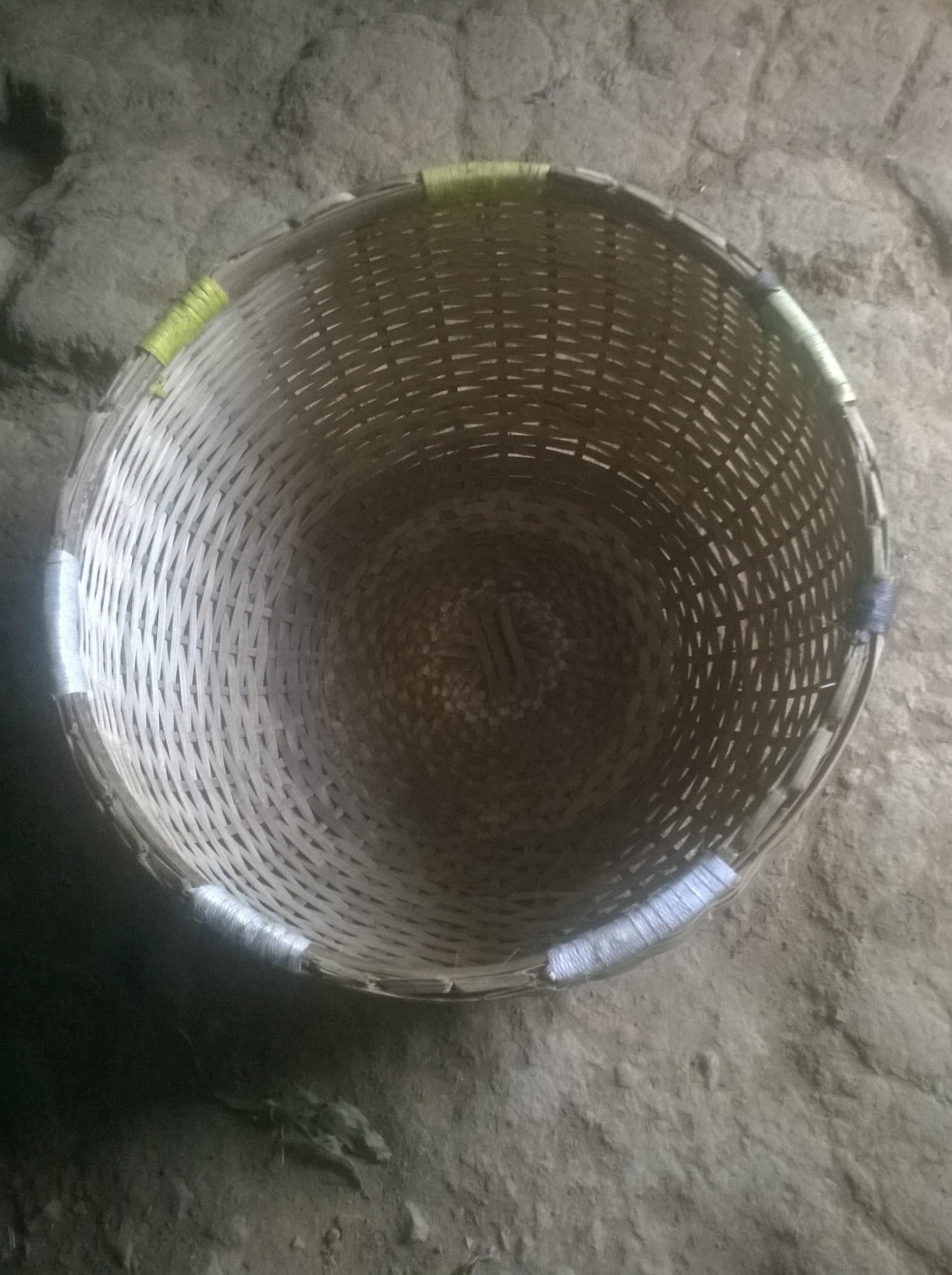 Produit de l'artisanat local